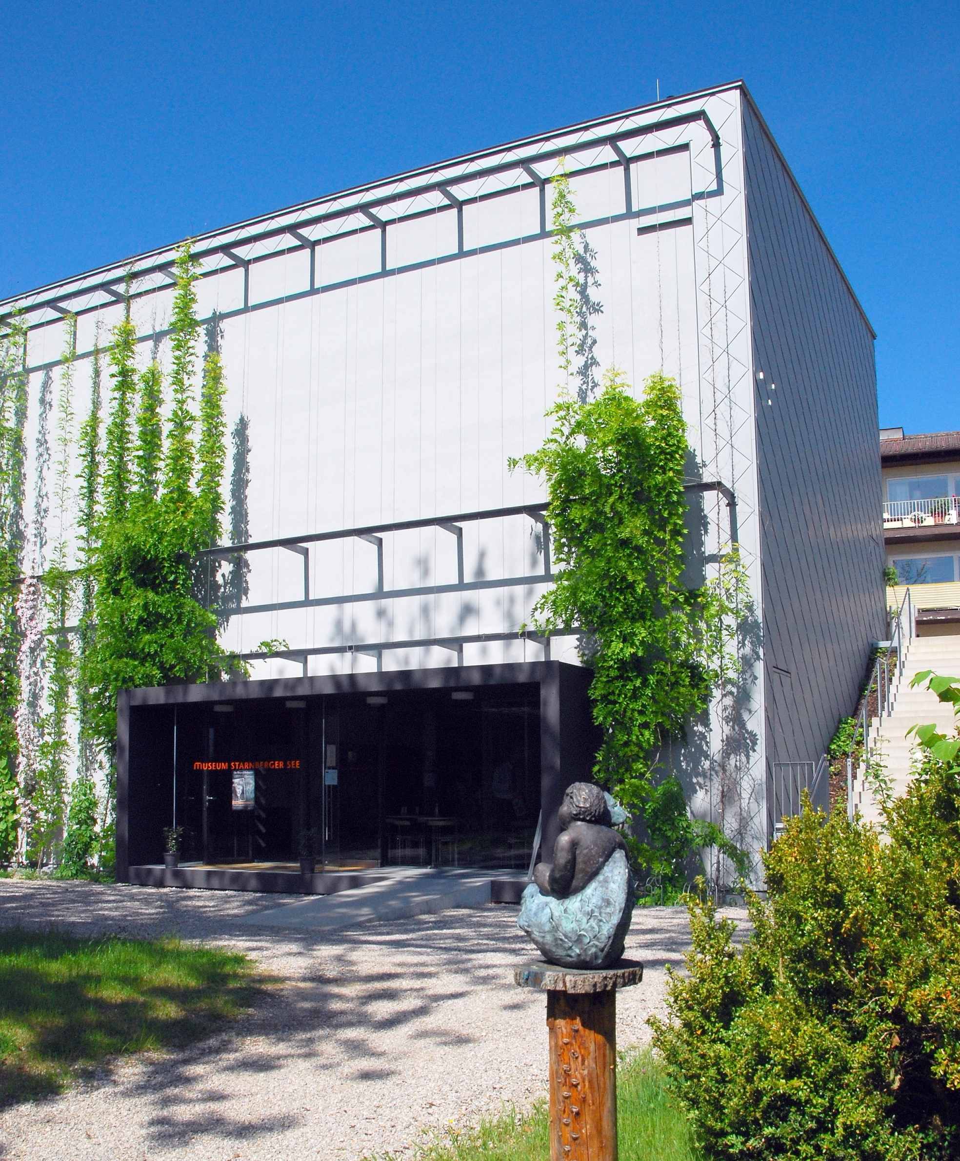 Starnberg, Museum Starnberger See, 'Neues Haus'. Im 2008 eröffneten Neubau des Museums steht die 'Höfische Schifffahrt auf dem Starnberger See' im 17. und 18. Jahrhundert im Mittelpunkt der Ausstellungen.